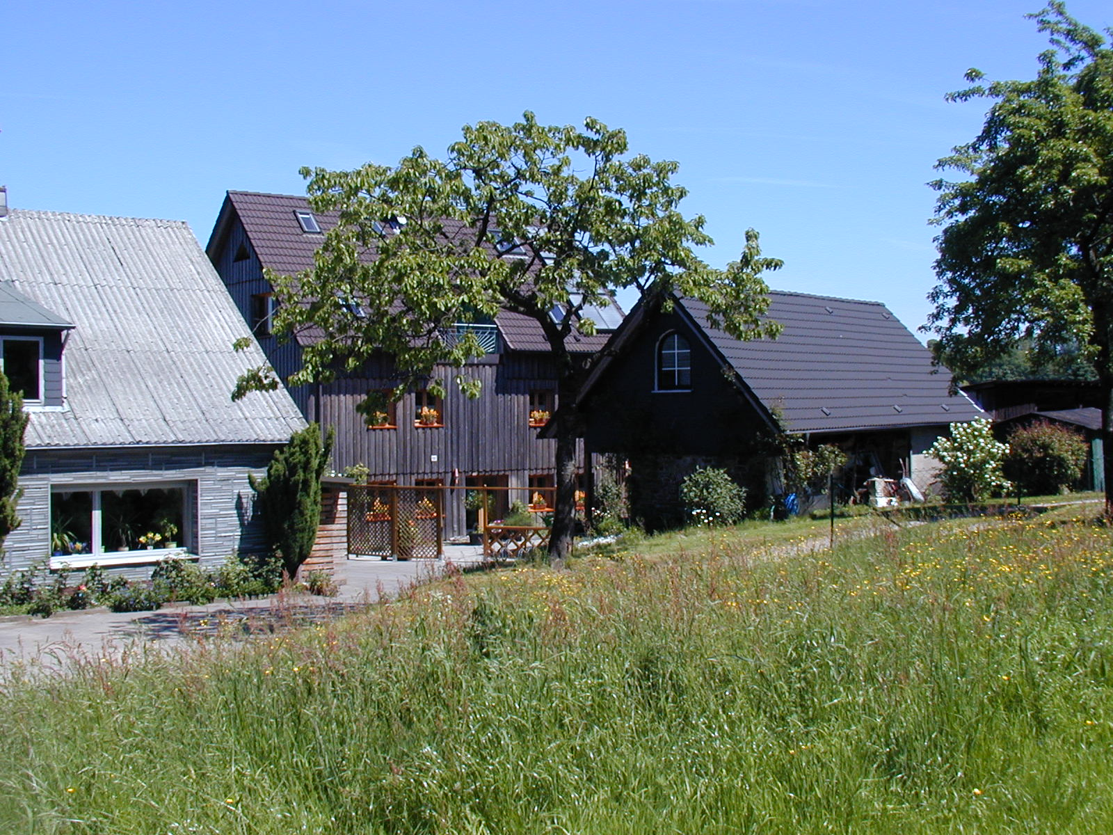 Ansicht in Breckerfeld-Brenscheid